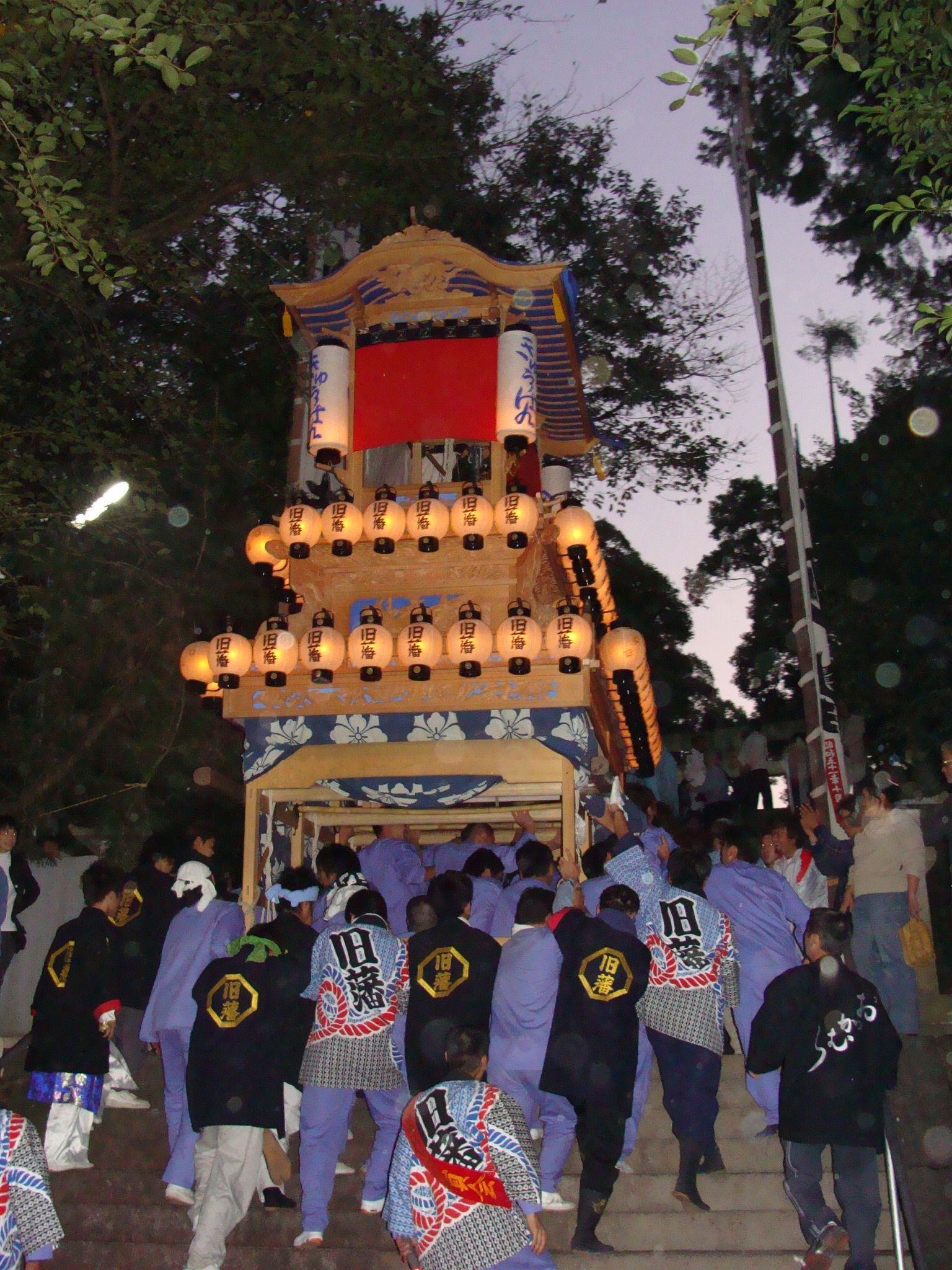 小松祭りでのだんじり階段上げ